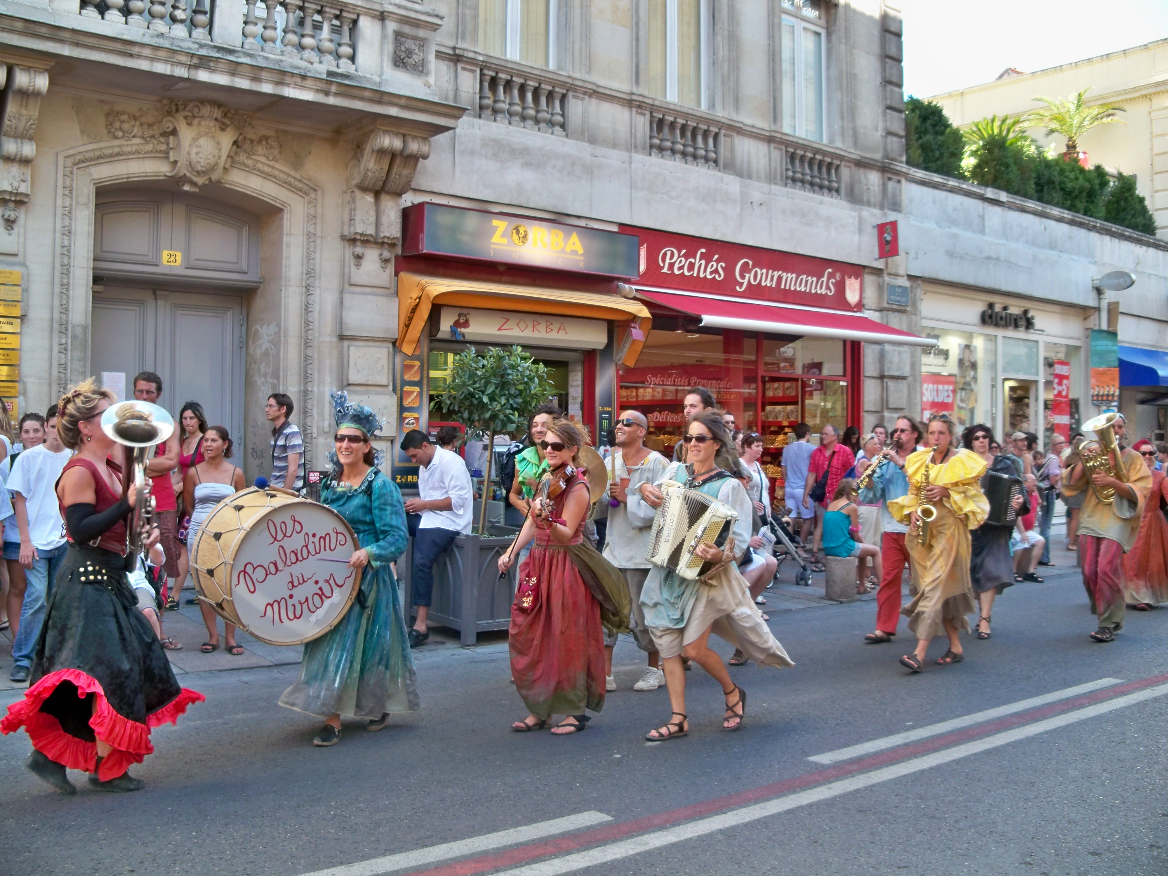 Troupe de théatre en parade, pour le Festival OFF, rue de la République à Avignon, Vaucluse